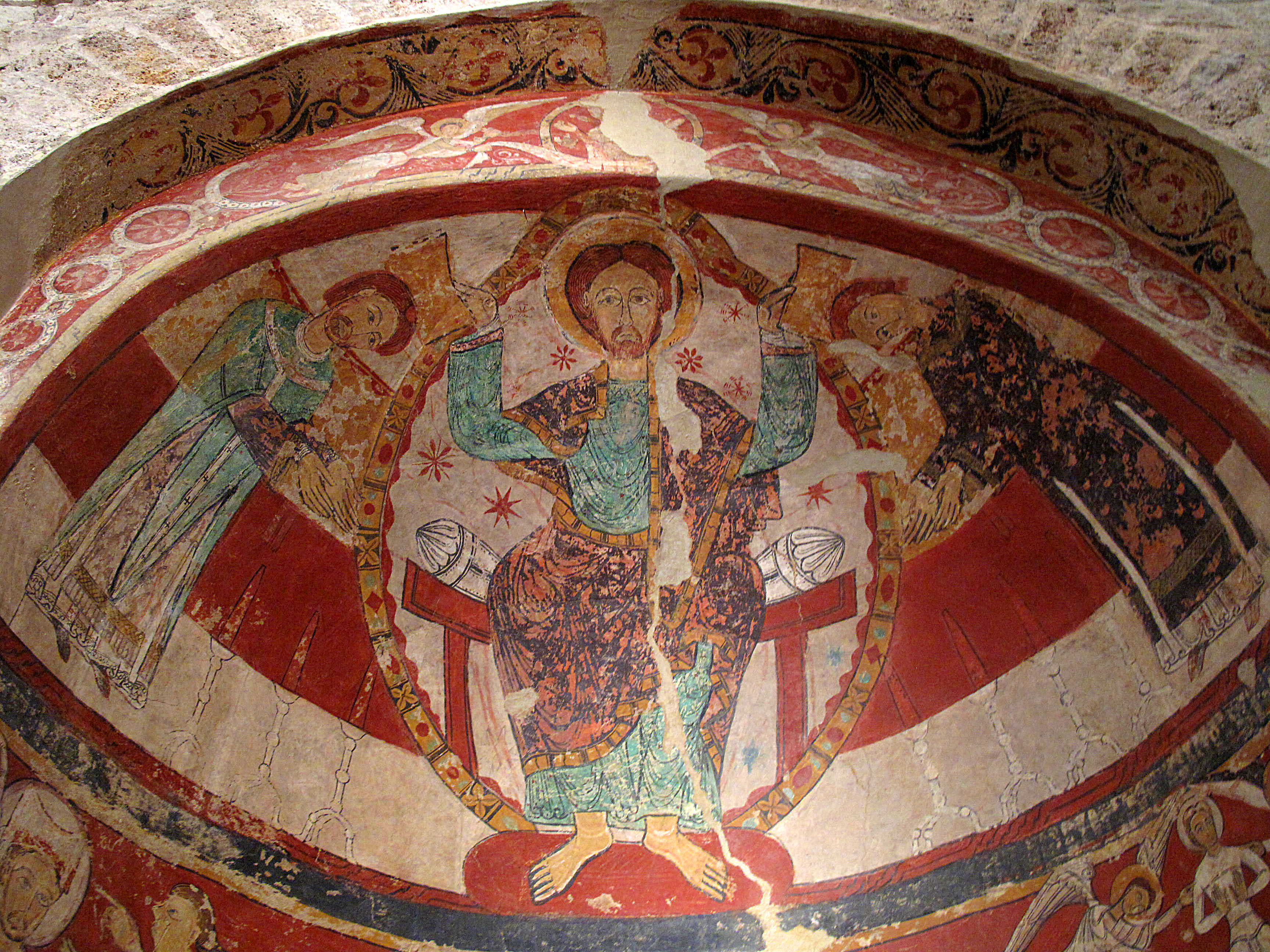 Església de Santa Maria (Terrassa)